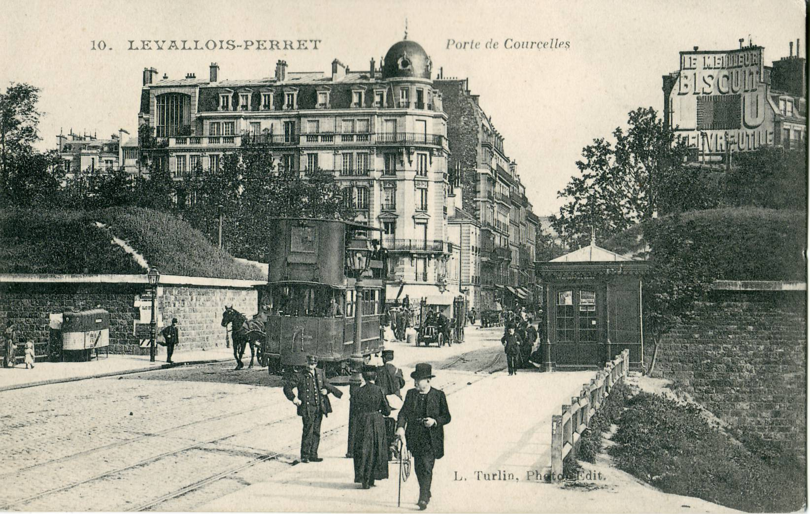 Carte postale ancienne éditée par Turlin LEVALLOIS-PERRET - Porte de Courcelles